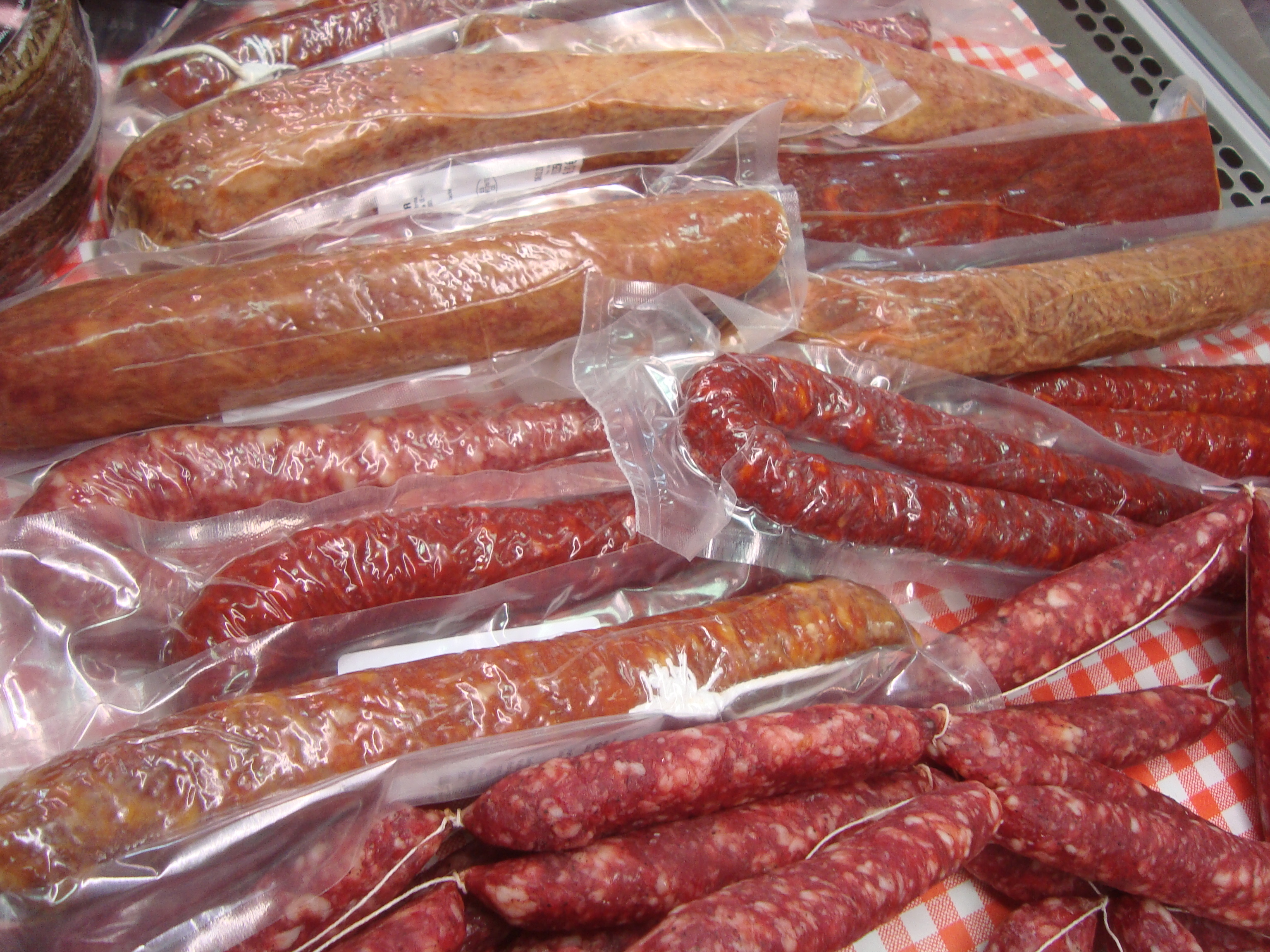 Piezas de embutidos envasados al vacío.